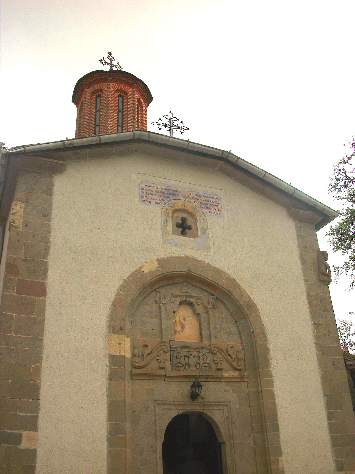 Манастир Драганац